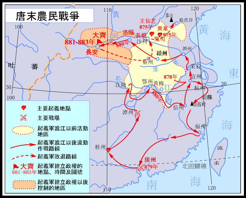 唐末農民起義圖。